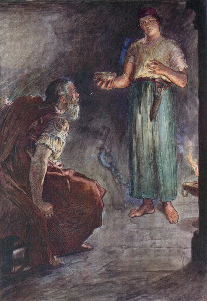 Filopemene in prigione, illustrazione tratta da "Plutarch's Lives for Boys and Girls, raccontati da W.H. Weston, London 1910", litografia a colori.